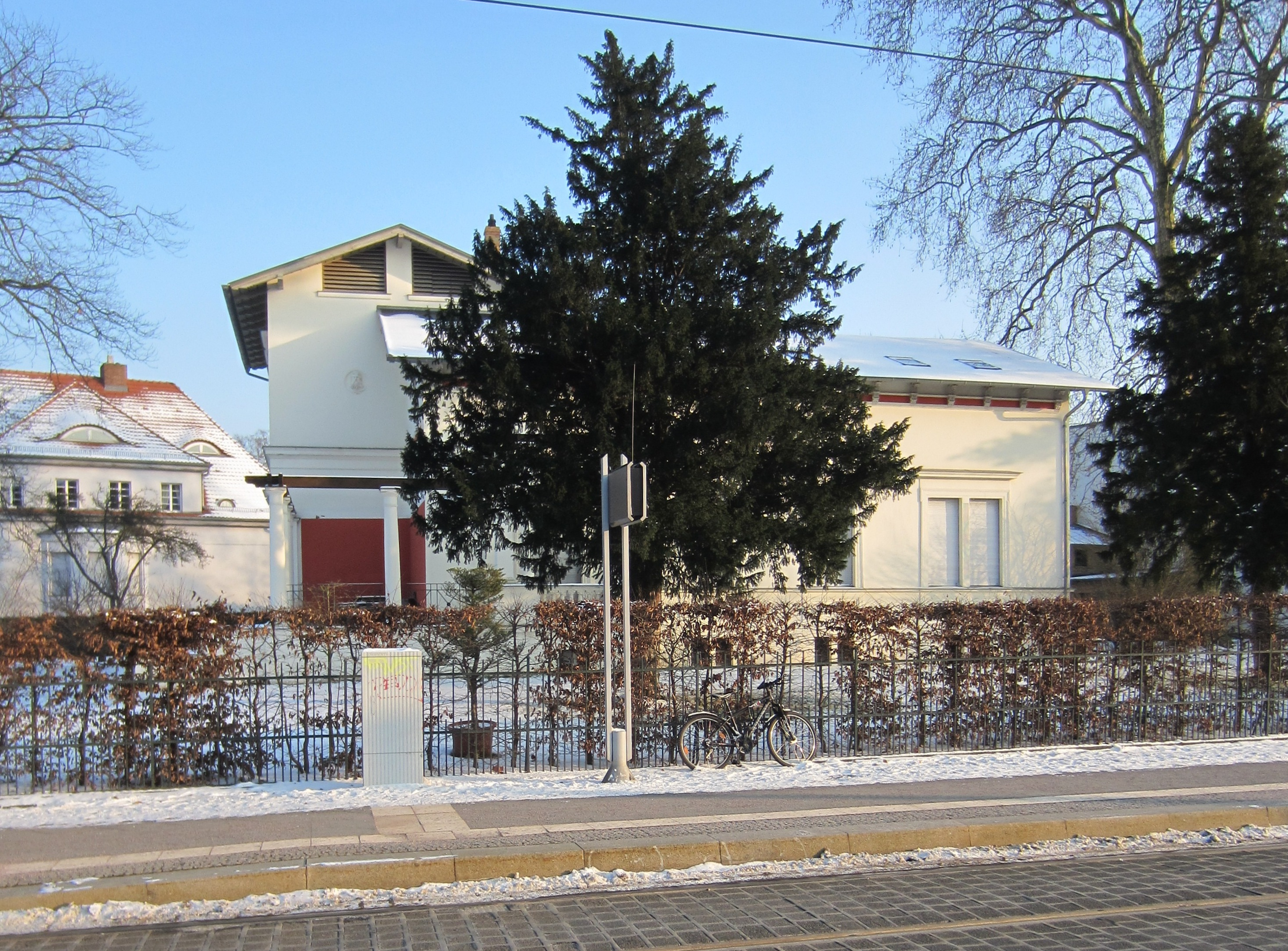 Denkmalgeschützte Villa Lehmann, Puschkinallee 9 in Potsdam, erbaut 1867/68 nach Plänen von Ernst Petzholtz, Ansicht von Westen